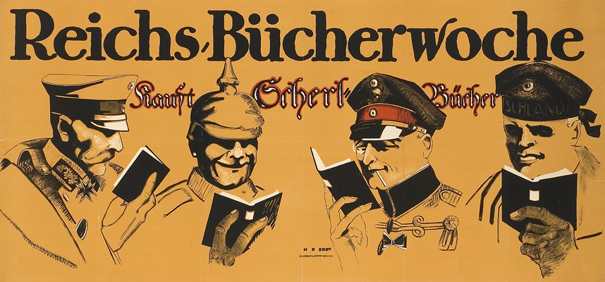 Werbeplakat: Reichs-Bücherwoche. Kauft Scherl-Bücher. Verlag August Scherl, Berlin. Deutschland ca. 1915/16.